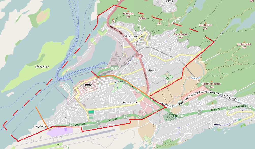 Kart over indre by i Bodø. Rød markerer den geografisk største definisjonen, mens oransje viser en geografisk mindre.